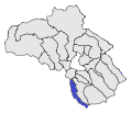 Palau de Cerdanya a l'Alta Cerdanya, mapa obtingut a partir d'un altre mapa de lliure disposició.